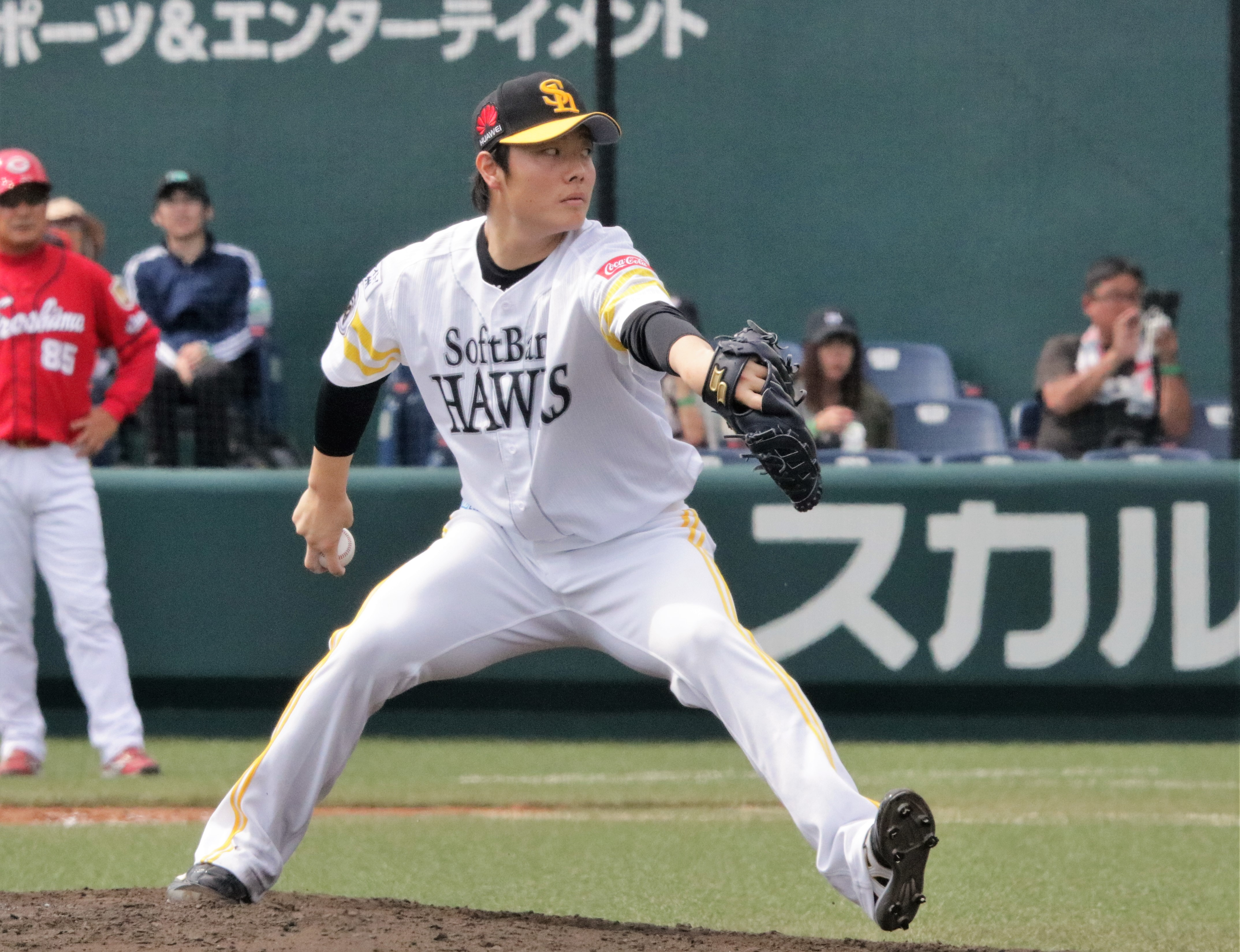 2018年5月5日 ウエスタンリーグ